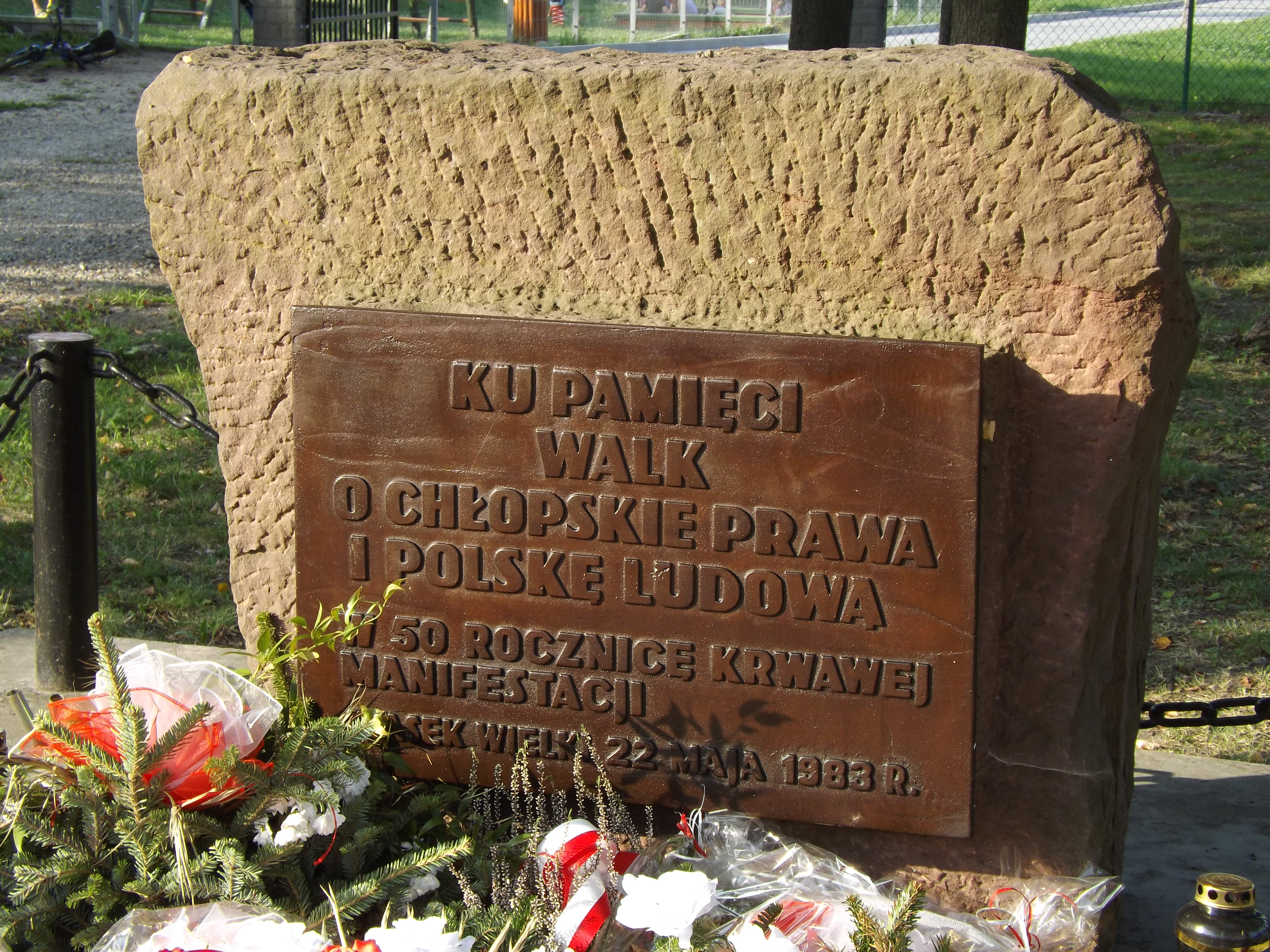 Pomnik w Piasku Wielki upamiętniający manifestację chłopską z 1933.